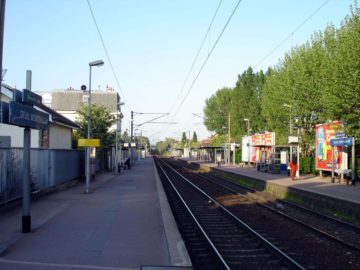 Gare de Deuil - Montmagny à Deuil-la-Barre (Val-d'Oise), France